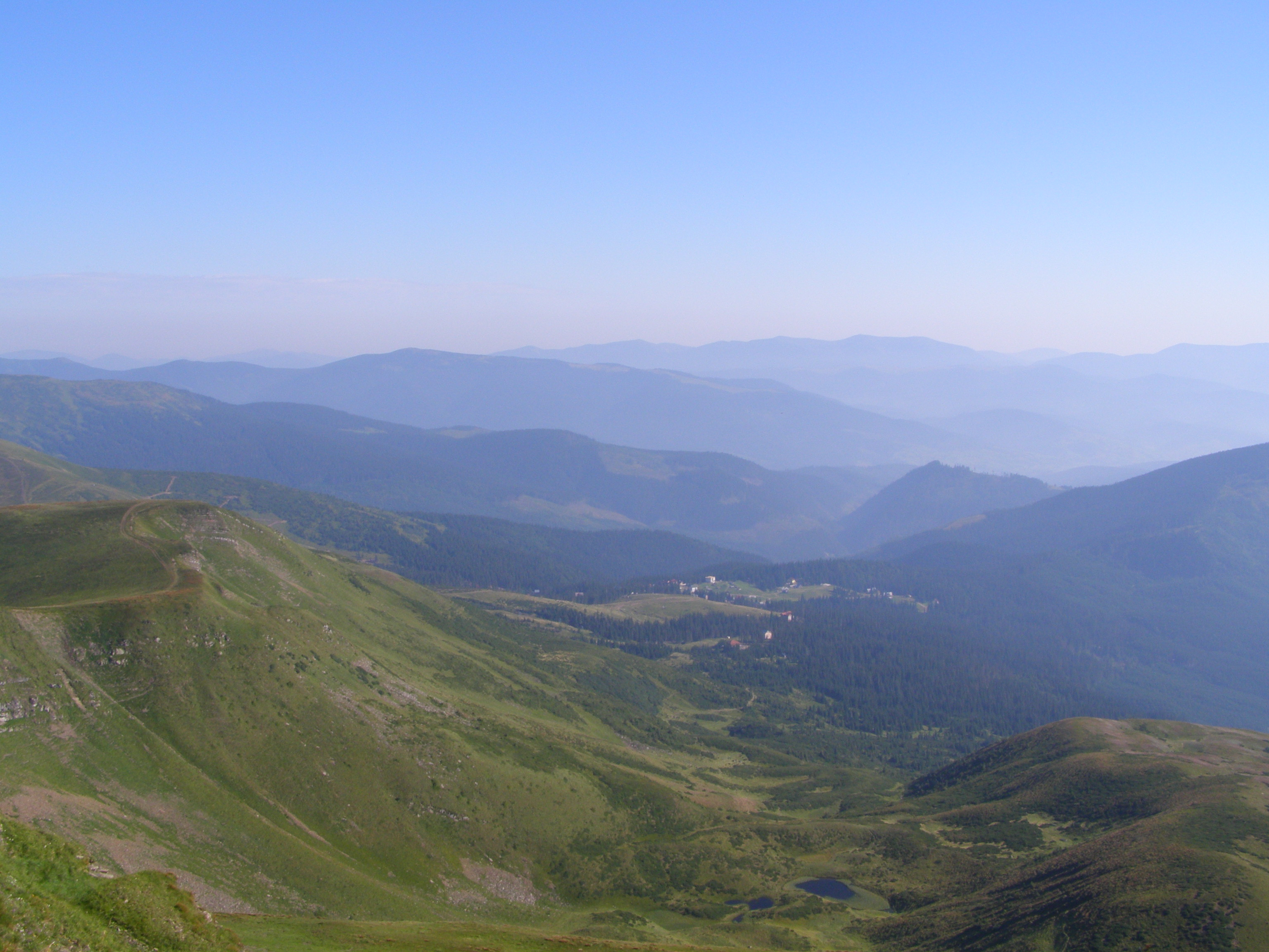 Вид з вершини Близниця (1881 м, найвища гора масиву Свидовець) в півночному напрямку, на зону відпочинку Драгобрат. Ліворуч гора Драгобрат. На задньому плані Ґорґани